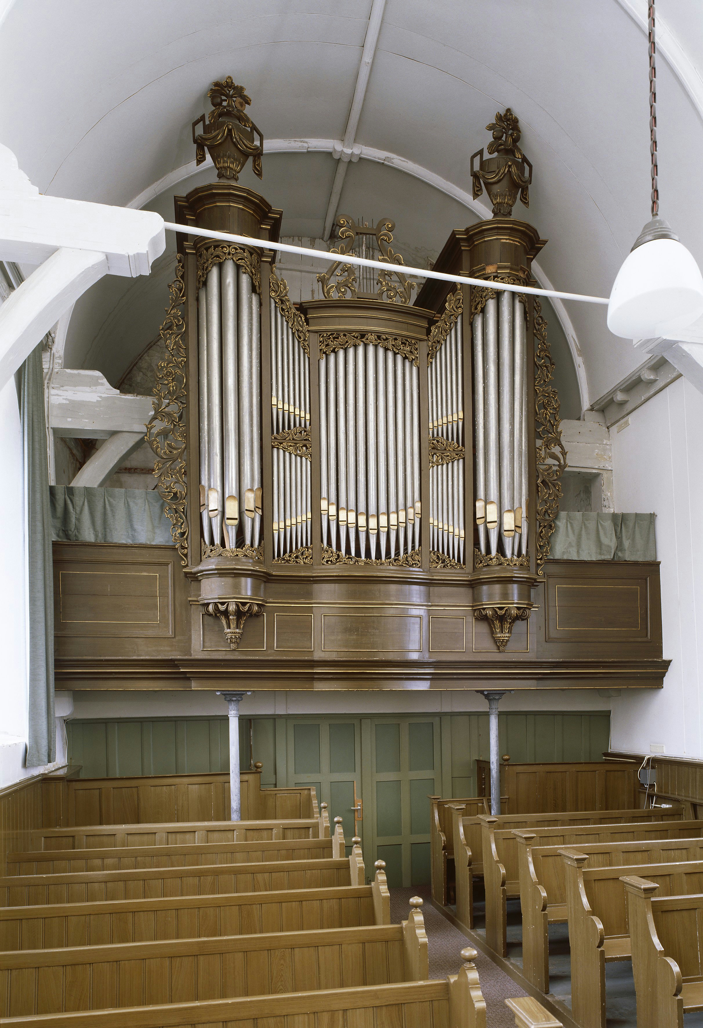 Nederlands Hervormde Kerk: Intenieur, aanzicht orgel, orgelnummer 896 (opmerking: Gefotografeerd voor Het Historische Orgel in Nederland 1872-1878, bladzijde 204)